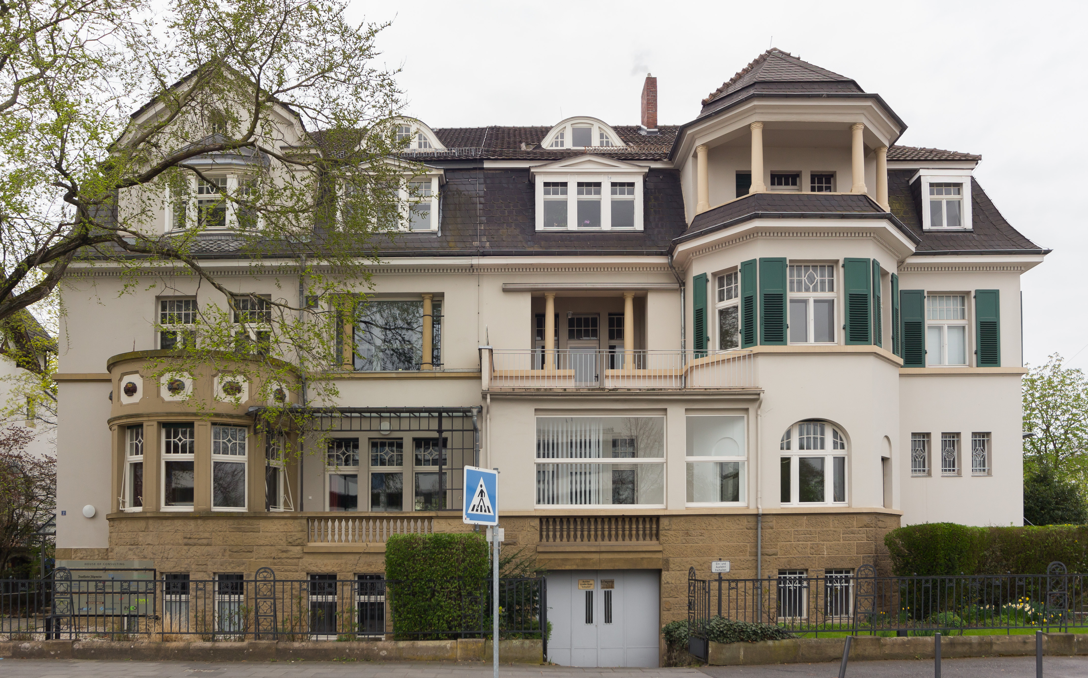 Doppelvilla, Kurt-Schumacher-Straße 2 (li.), Heussallee 40 (re.), Bonn